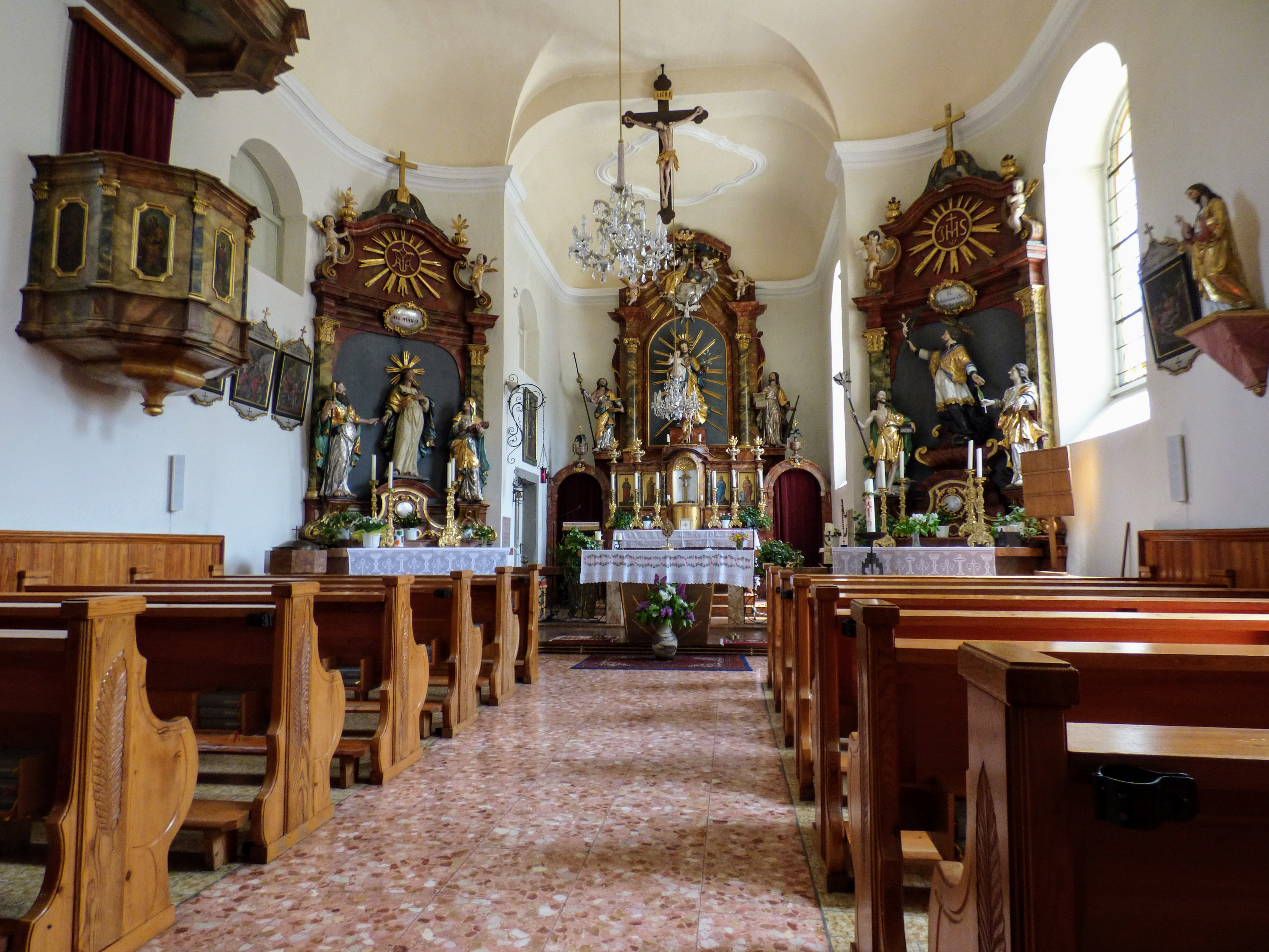 Inneres der Pfarrkirche Untertauern